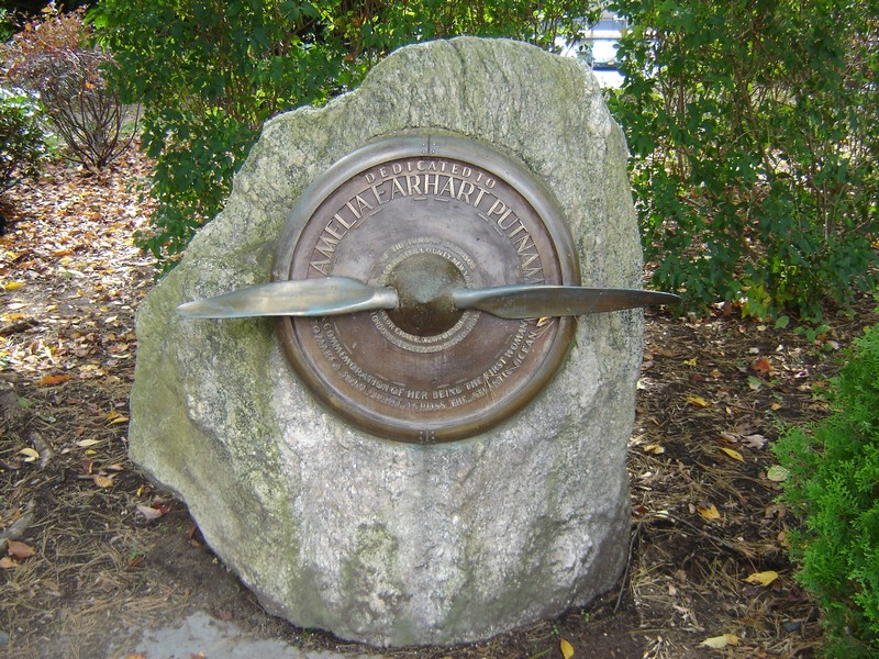 monument en mémoire d'Amélia, Harrison,N.Y 10528